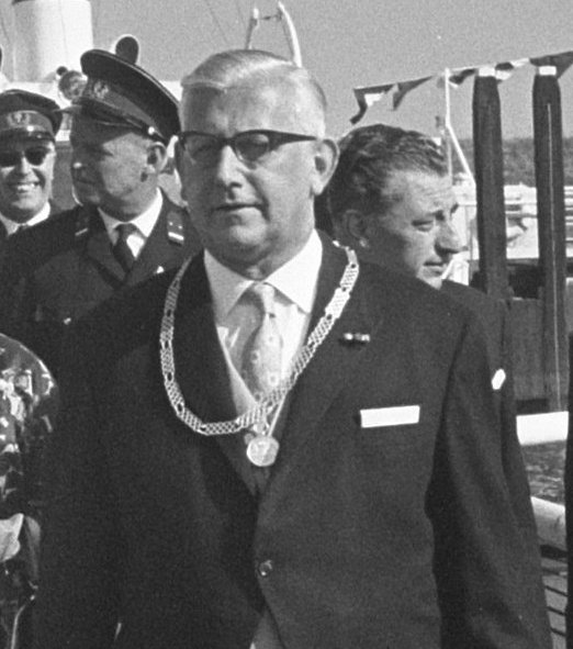 Collectie / Archief : Fotocollectie Anefo Reportage / Serie : Koningin Juliana bezoekt de Deltawerken Beschrijving : Aankomst van koningin Juliana in Colijnsplaatt; links naast de koningin de Commissaris der Koningin in Zeeland, jhr. De Casembroot; rechts, achter burgemeester Schuit van Kortgene, minister Van Aartsen van Verkeer en Waterstaat Datum : 2 september 1964 Locatie : Kortgene, Zeeland Trefwoorden : aankomsten, burgemeesters, commissarissen van de koningin, koninginnen, ministers Persoonsnaam : Aartsen, J. van, Casembroot, A.F.C. de, Juliana (koningin Nederland), Schuit, A.A. Fotograaf : Fotograaf Onbekend / Anefo, [onbekend] Auteursrechthebbende : Nationaal Archief Materiaalsoort : Negatief (zwart/wit) Nummer archiefinventaris : bekijk toegang 2.24.01.05 Bestanddeelnummer : 916-8399